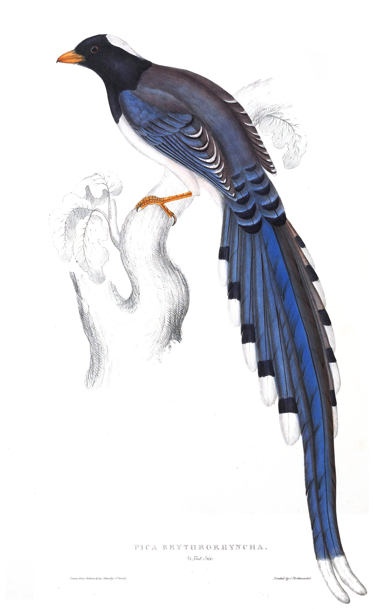 Urocissa erythrorhyncha